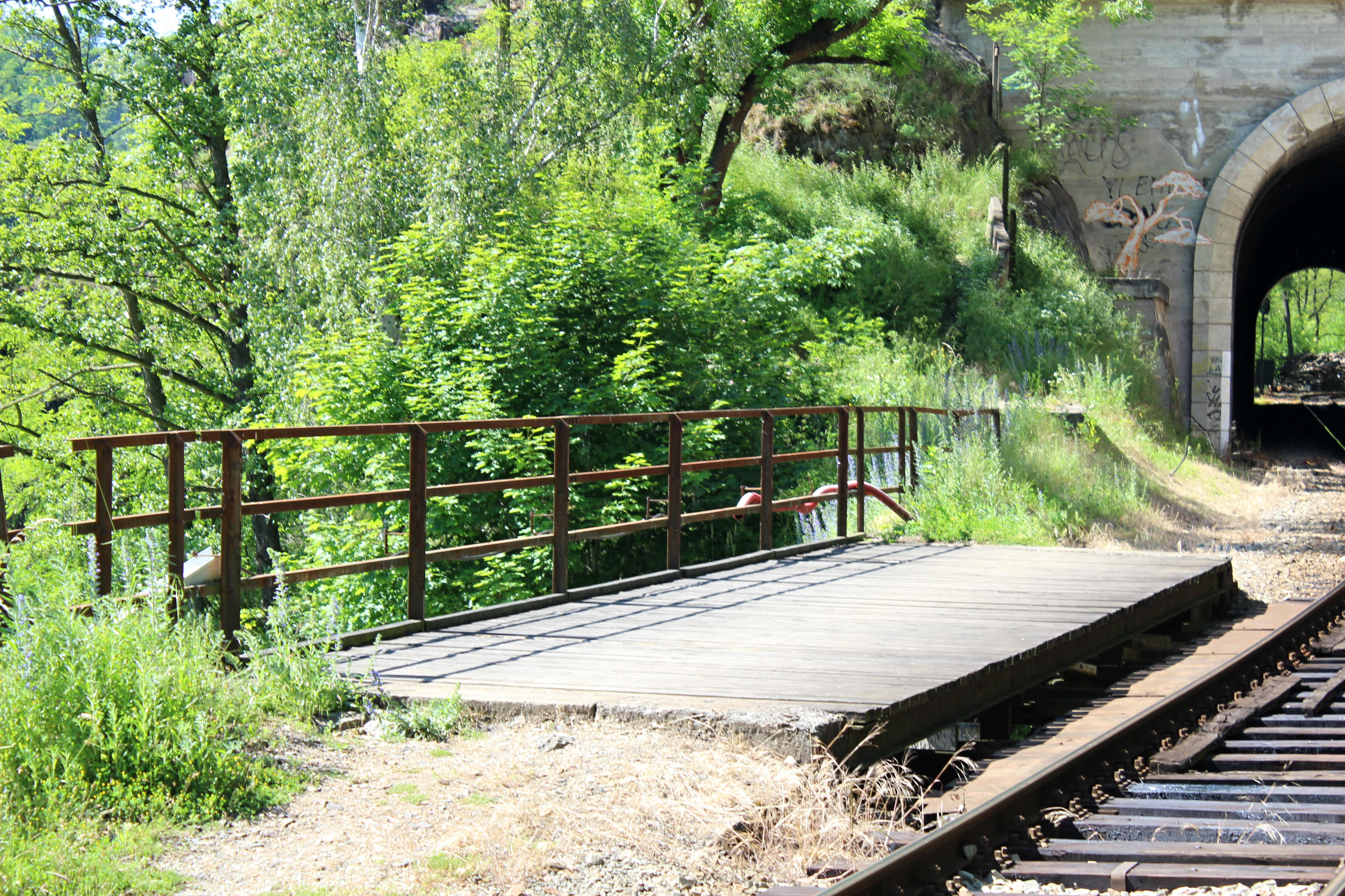 Libřice most přes ústí Záhořanského potoka - detail nástupiště